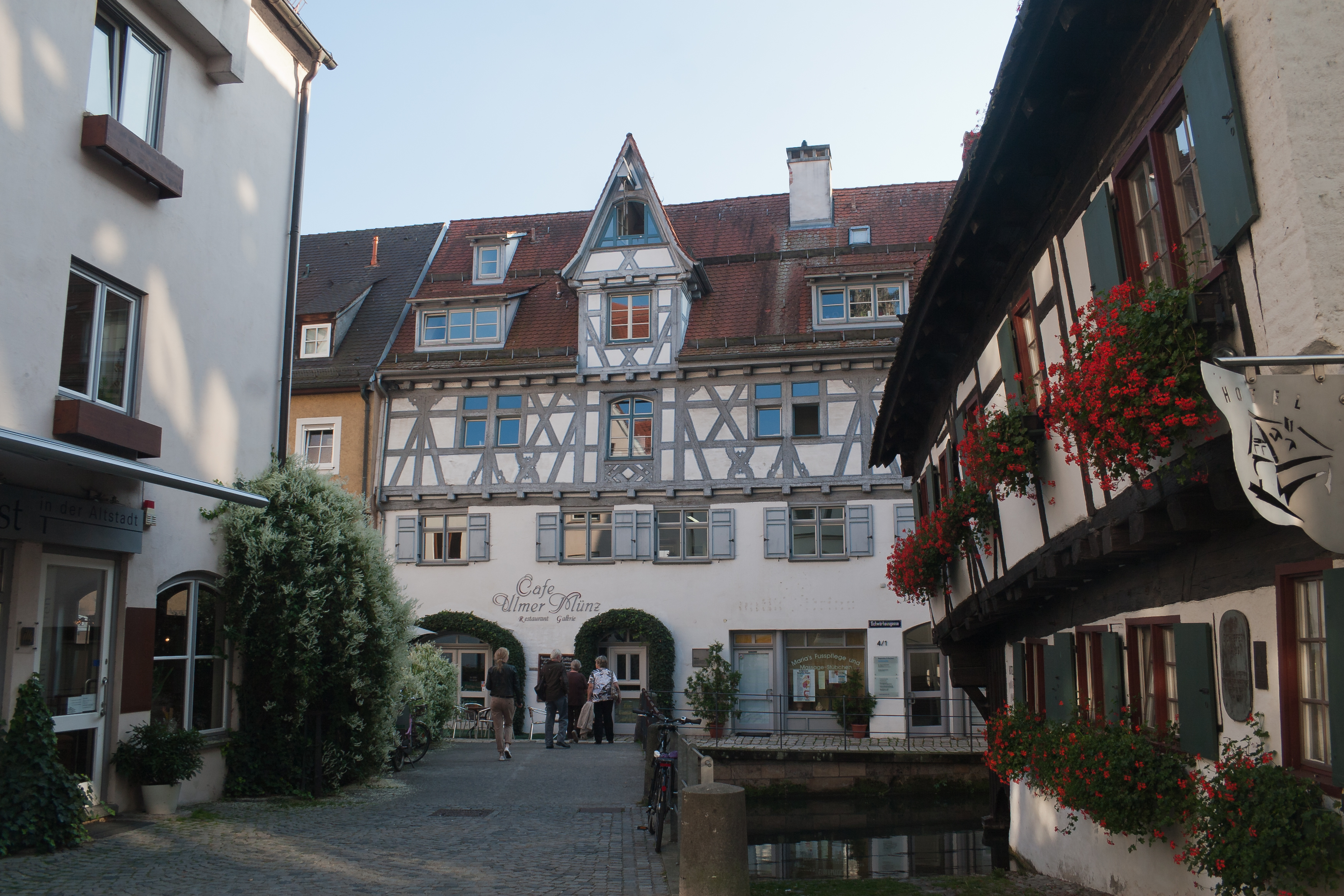 Ulm, Baden-Württemberg, Germany